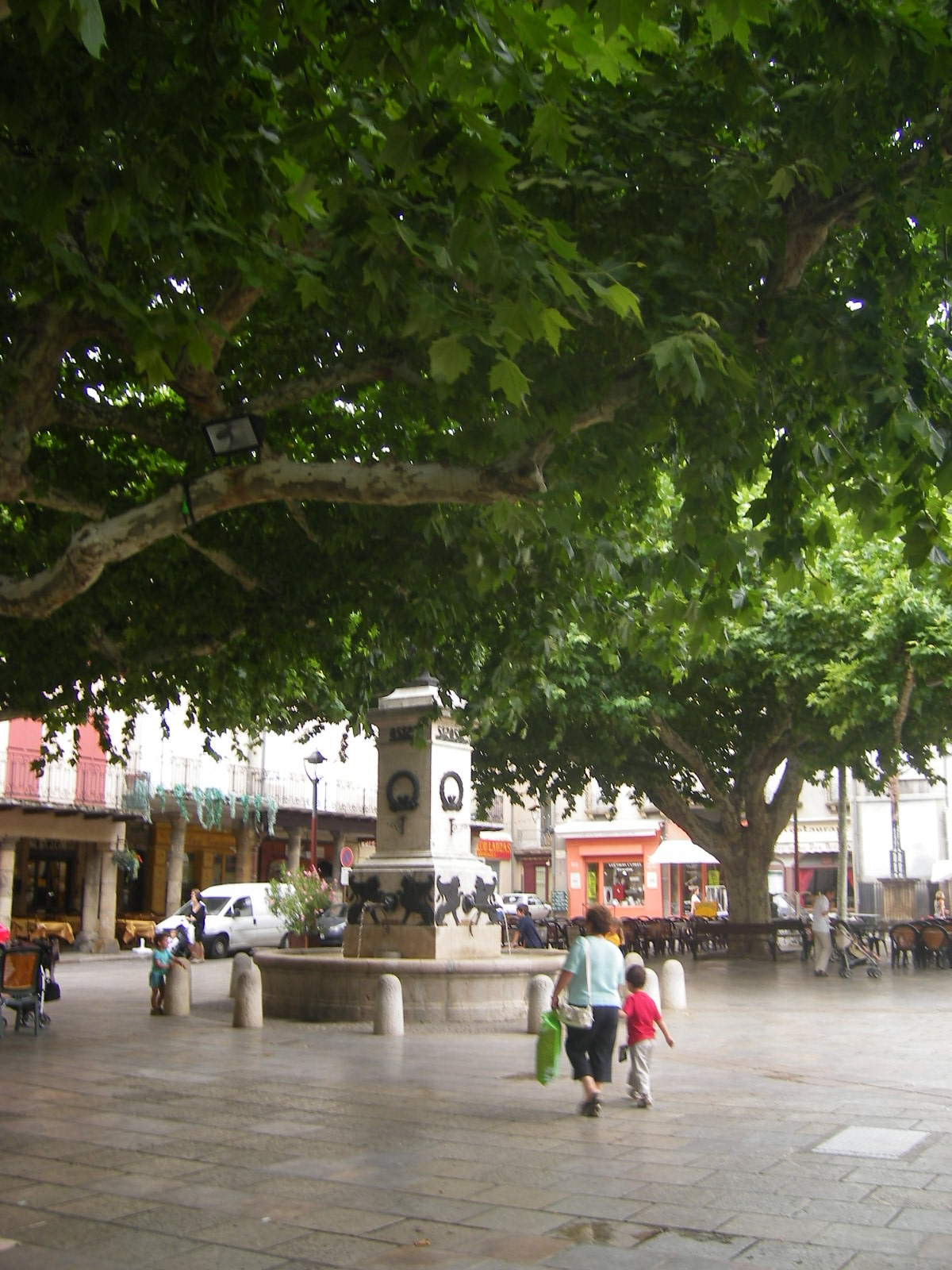 Millau